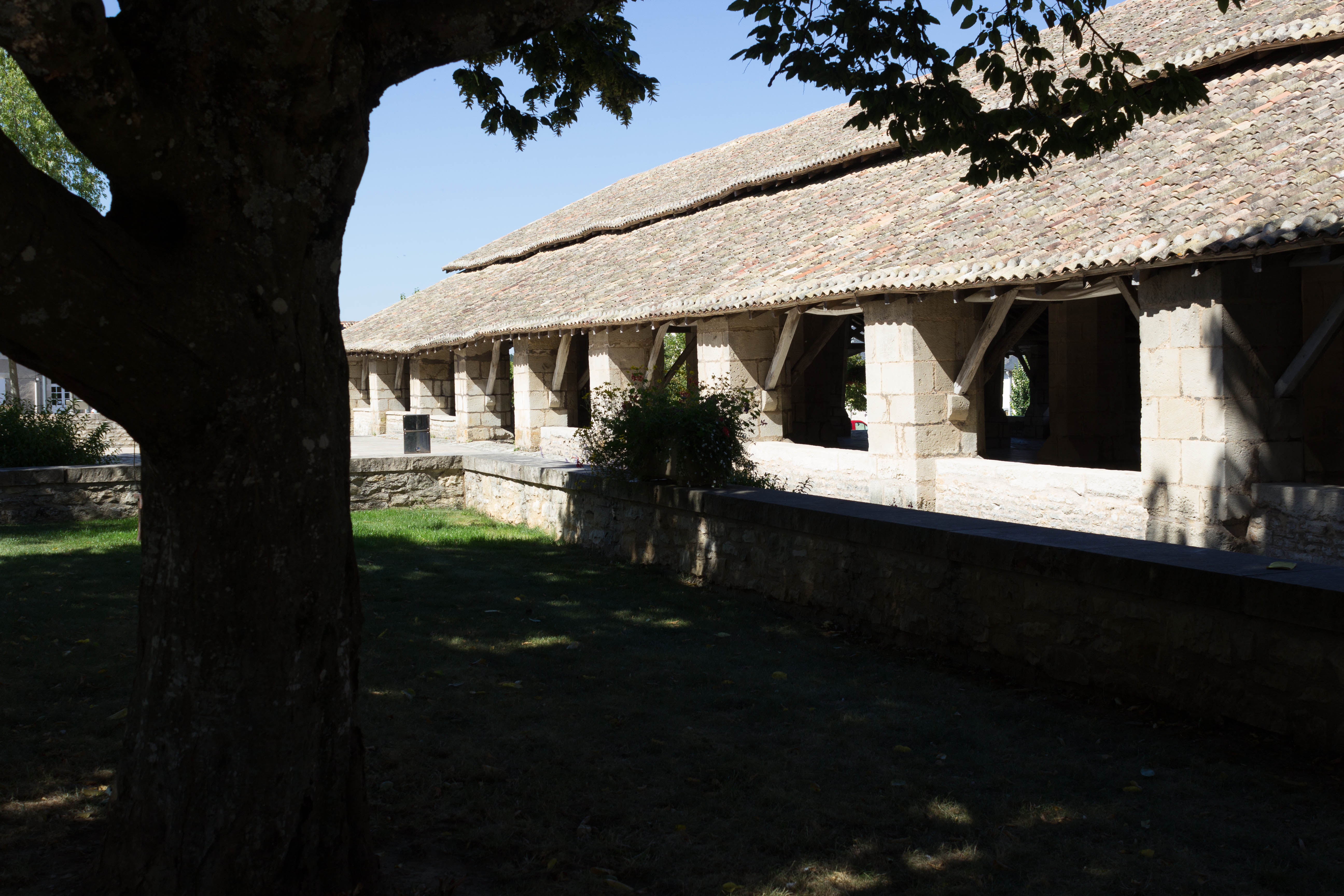 Vue de l'extérieur des Halles de Couhé